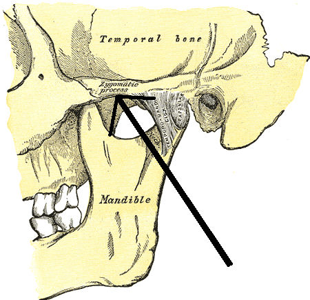 Módosítva